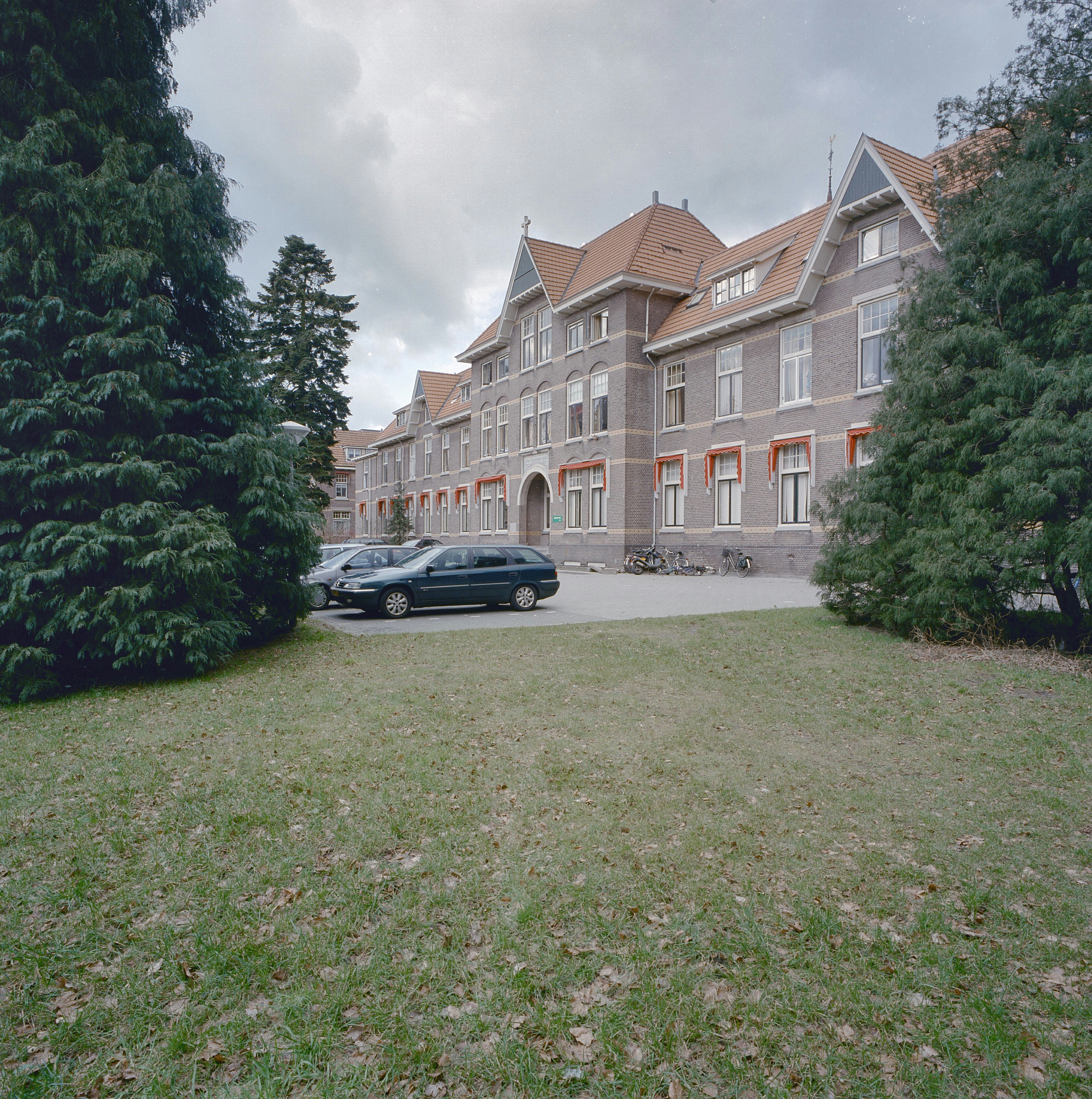 St. Alphonsus: Exterieur overzicht voorgevel